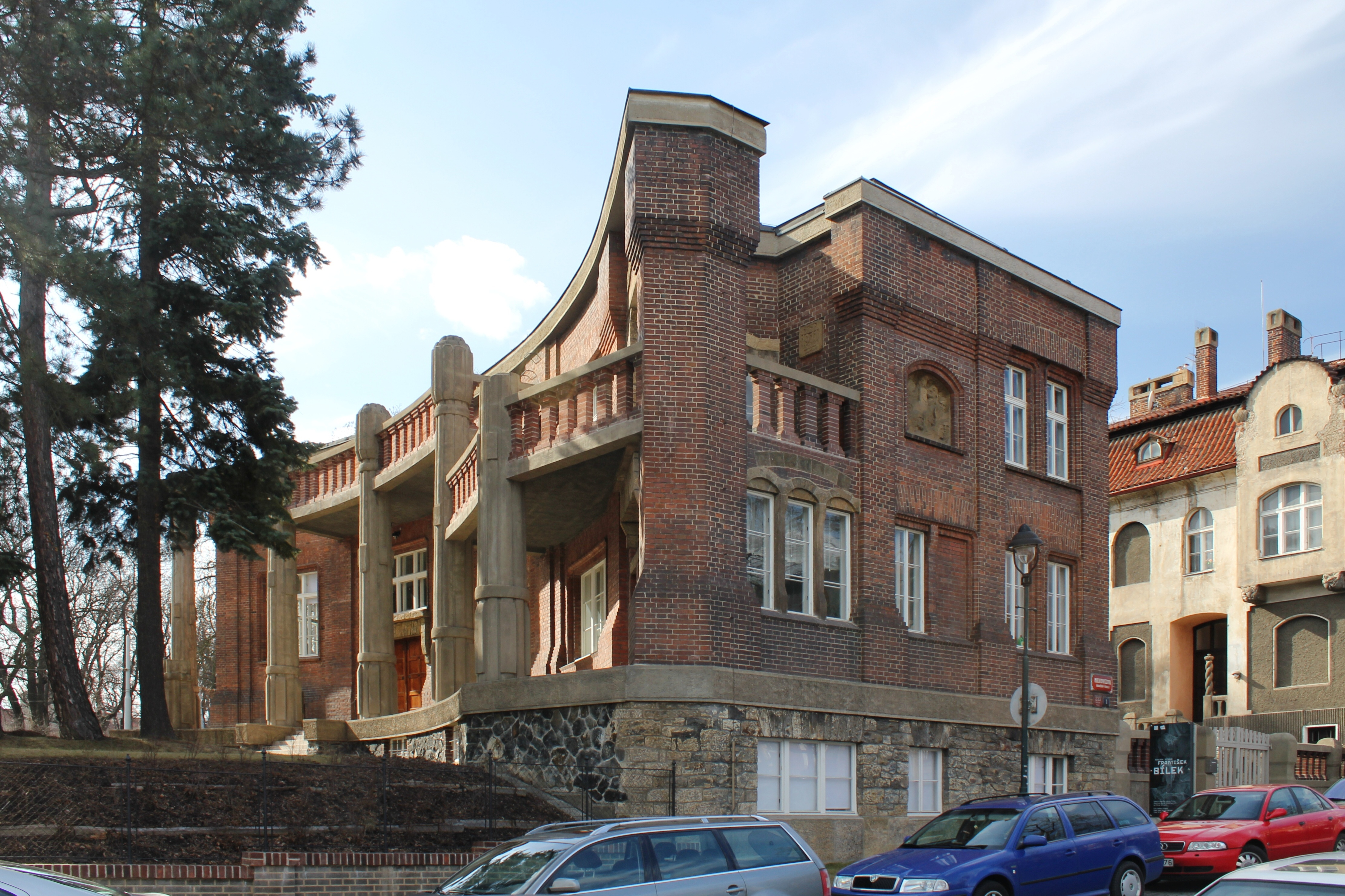 Bílkova vila